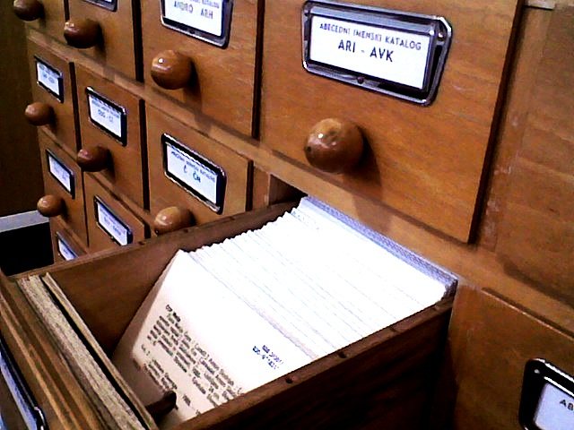 Listkovni abecedno imenski katalog Koroške osrednje knjižnice dr. Franca Sušnika.